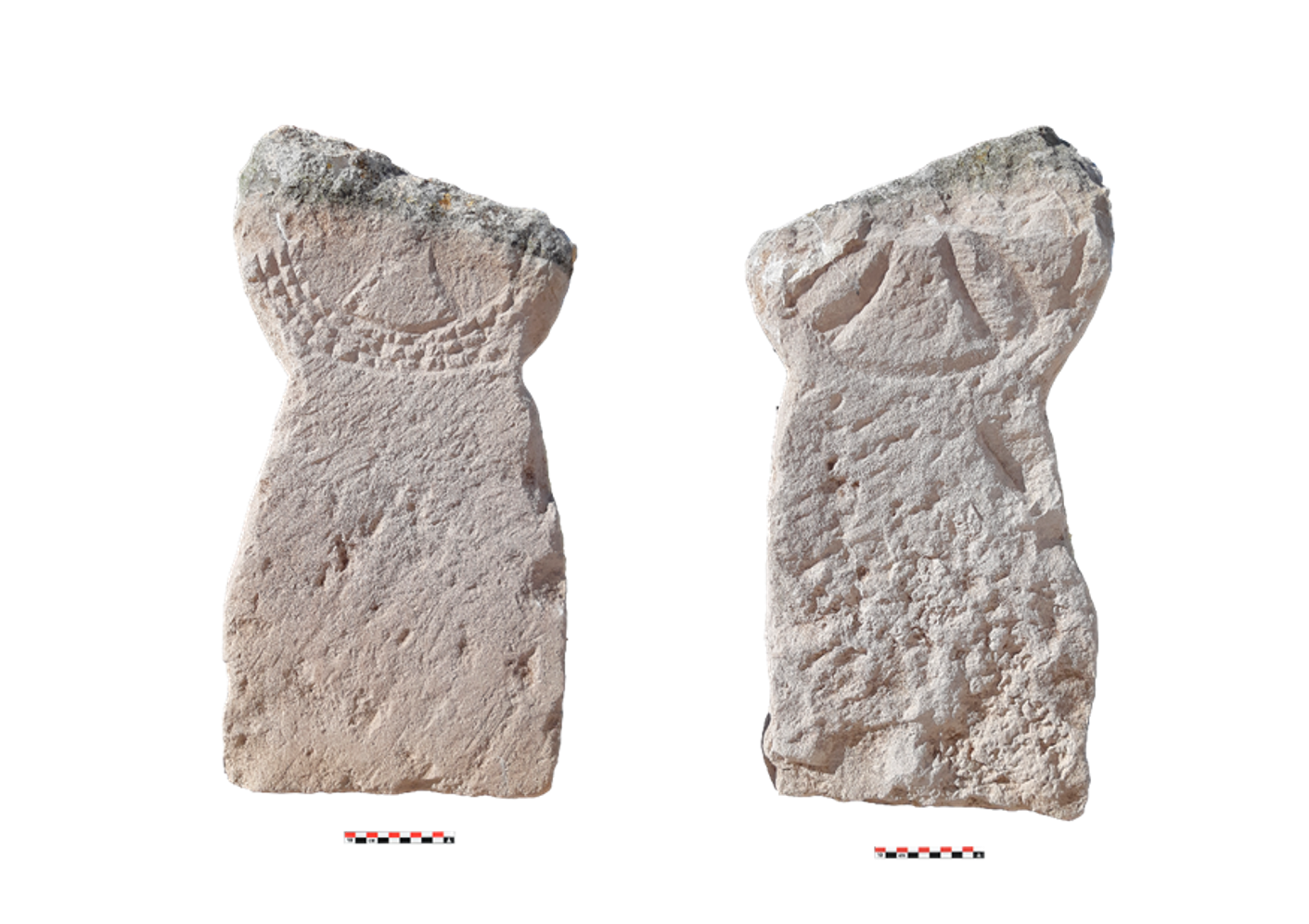 Las dos caras con motivos cruciformes de la Estela